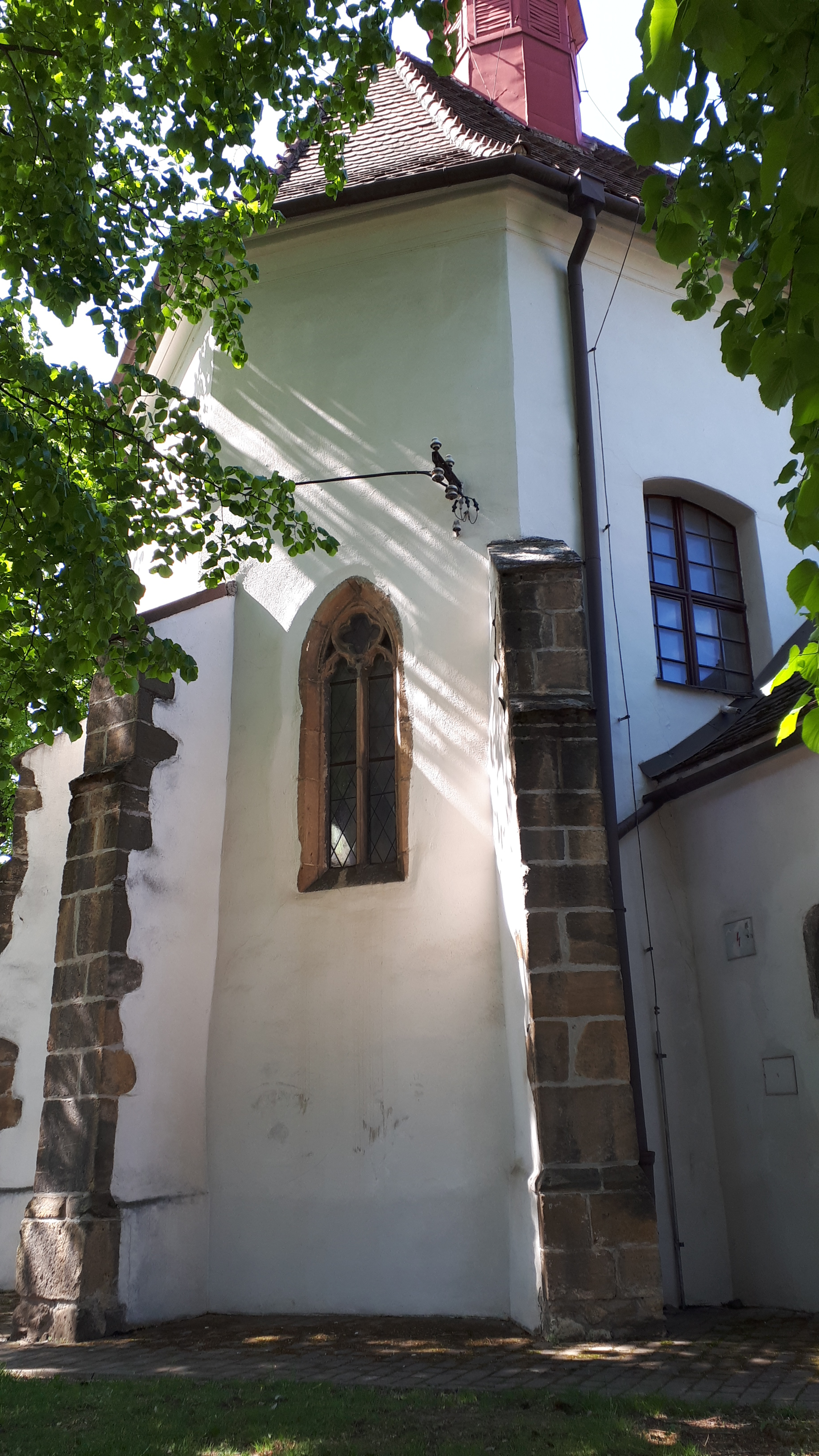 Drásov